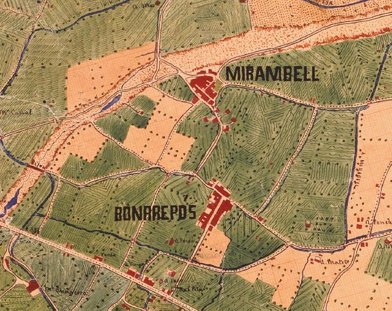 Bonrepòs i Mirambell el 1883 (el nord està a la dreta).